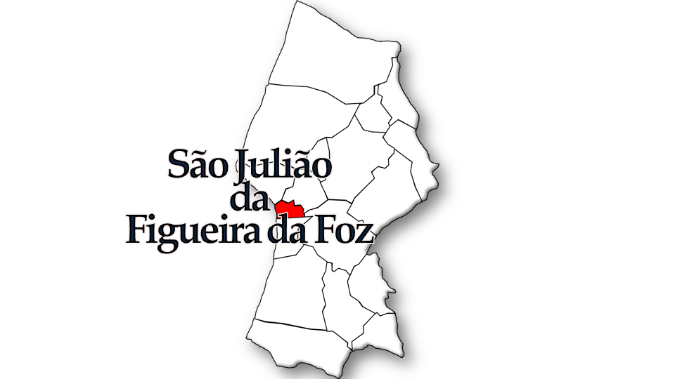 População